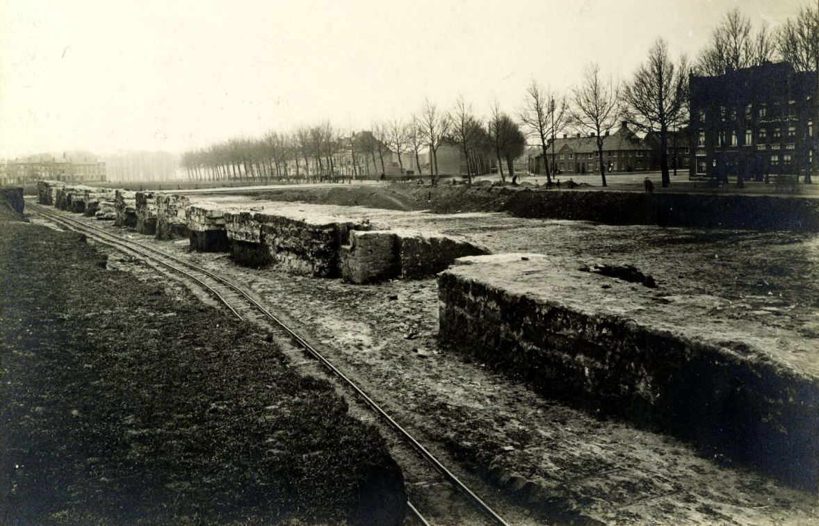 Blootlegging vestingmuur langs Hertogsingel nabij Brandenburgerplein.